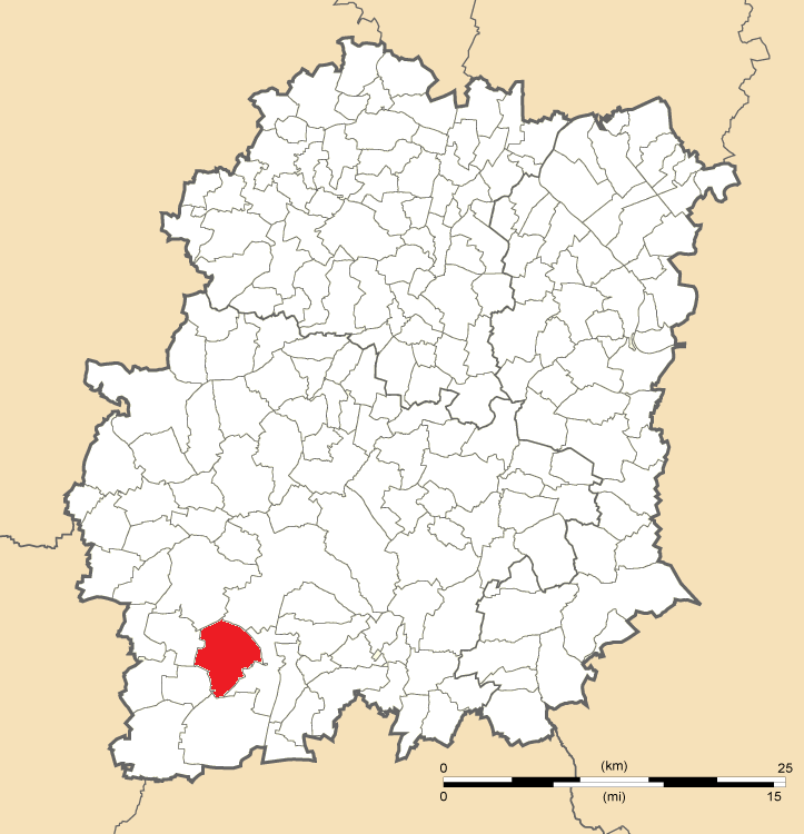 Carte de position de Guillerval en Essonne (91)